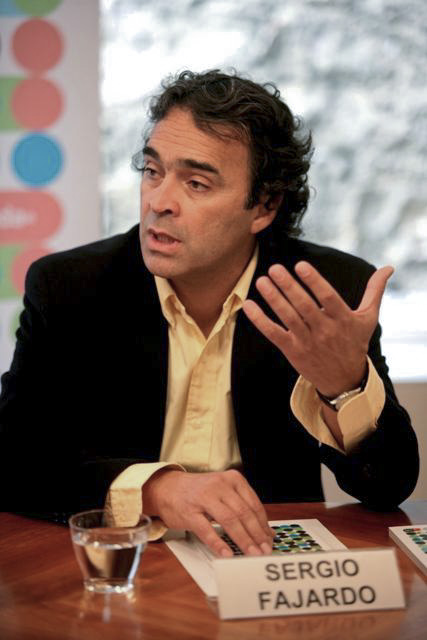 Fajardo asistió a la rueda de prensa de la entrega del premio City to City Barcelona FAD award que recibió la ciudad de Medellín por el proyecto "Medellín la más educada".